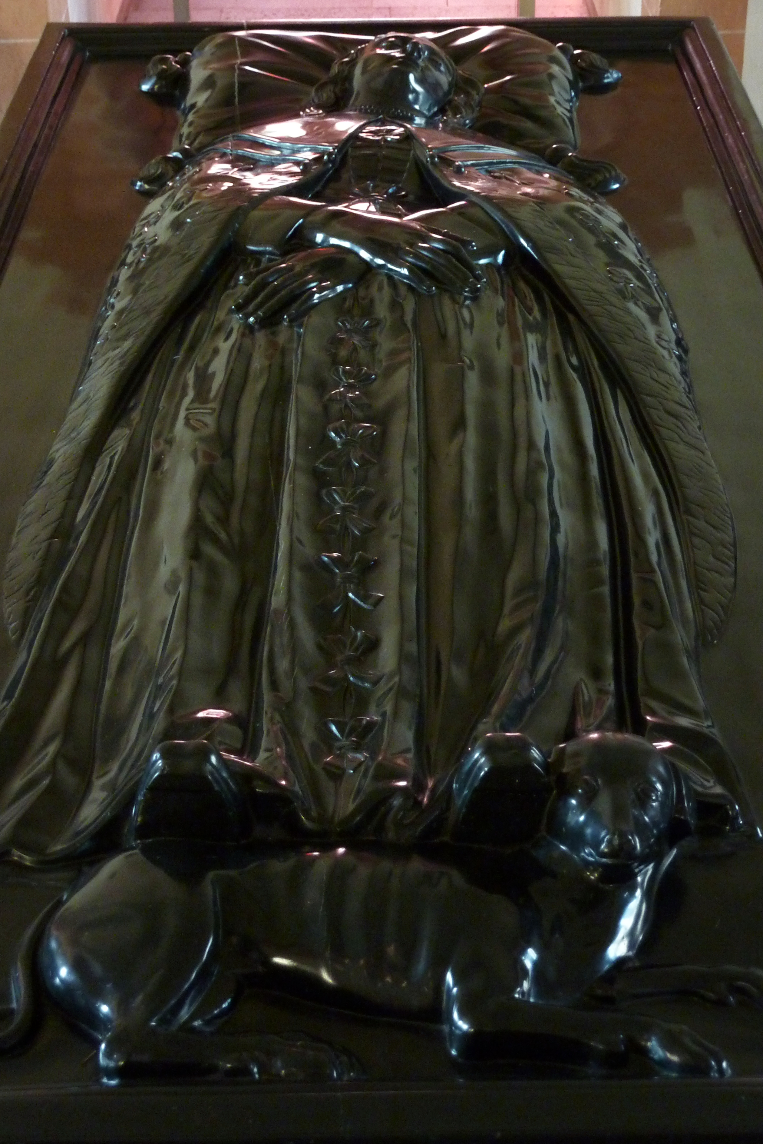 katholische Pfarrkirche St. Nikolaus und Rochus in Mayschoß, Grabmal der Katharina von der Mark